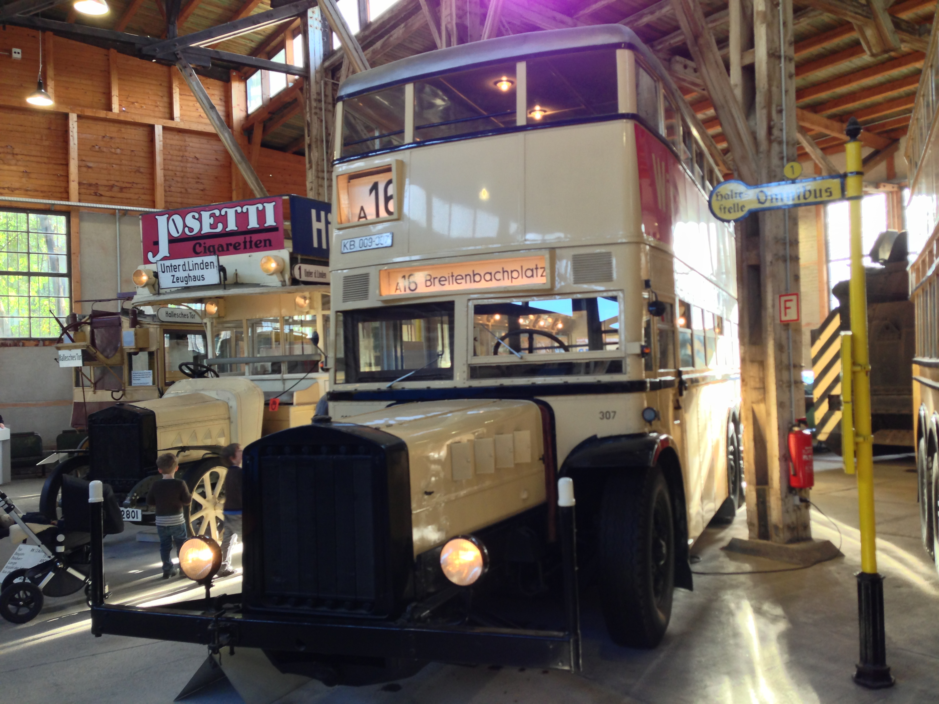 Depot des Deutschen Technikmuseums Berlin